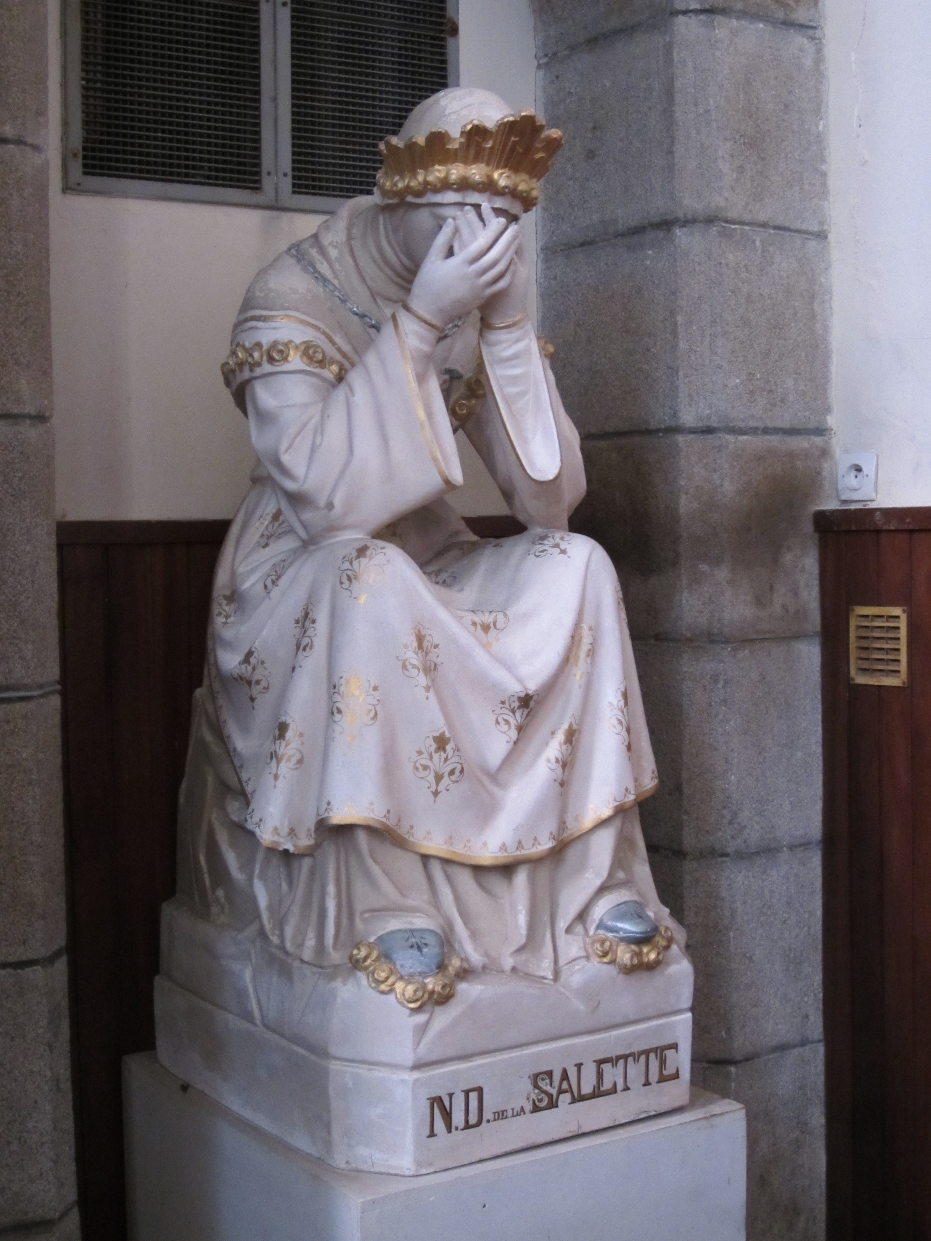 Saint-Jean-des-Champs, Manche